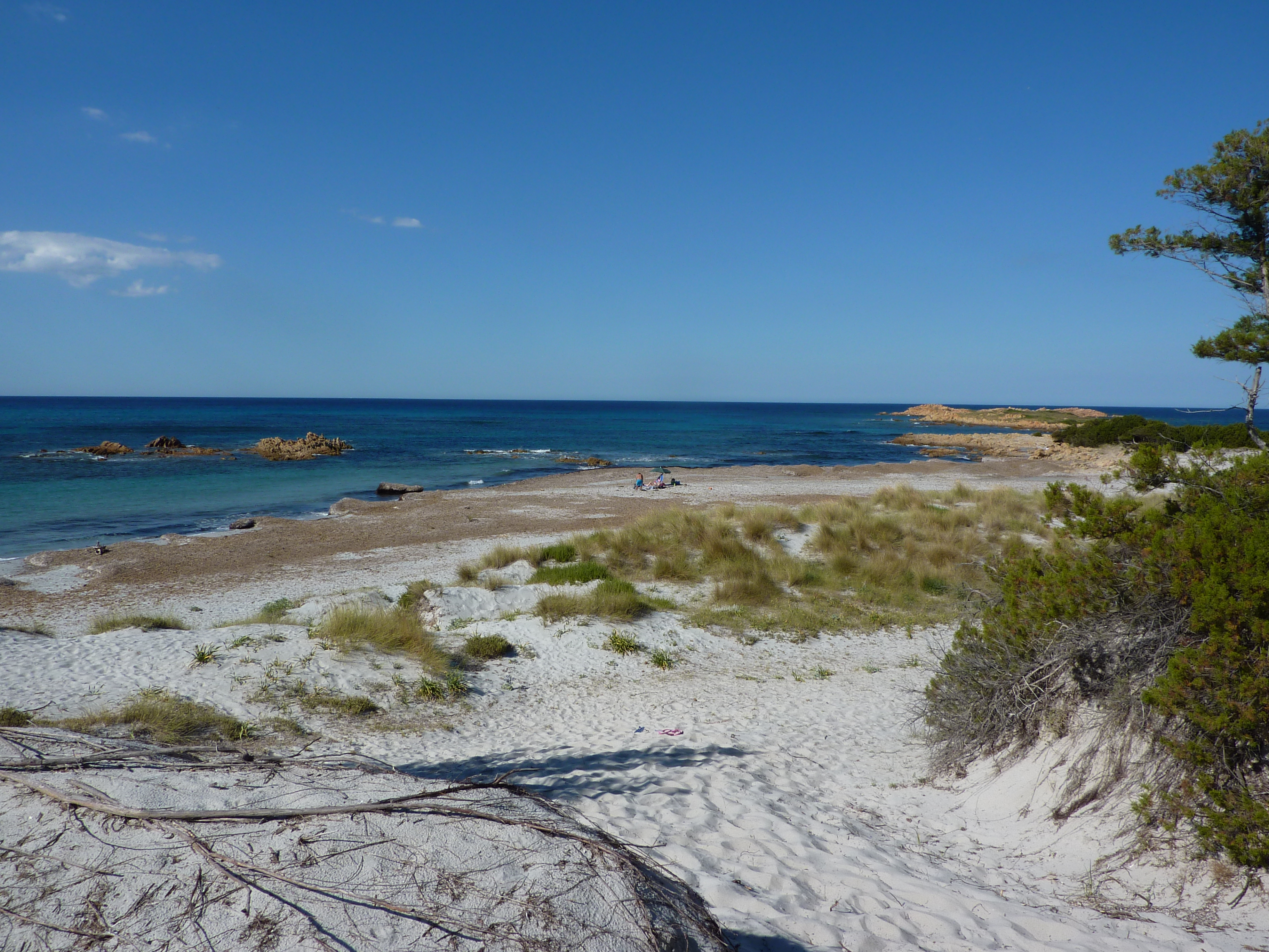 Sardegna, provincia di Nuoro, Siniscola: spiaggia di capo Comino